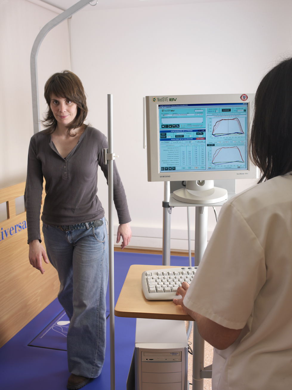 Laboratorio Biomecánica Mutua Universal